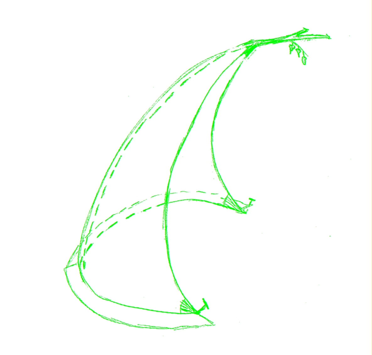 Description